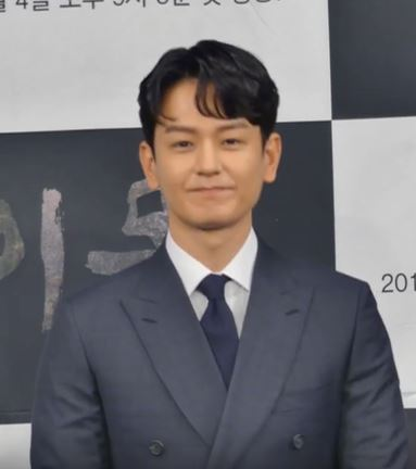 2일 오후 서울시 마포구 상암동 MBC 골든마우스홀에서 MBC 특별기획 ‘이몽’ 제작발표회가 열려 배우 임주환X남규리X이요원X유지태가 포토타임을 갖고 있다.